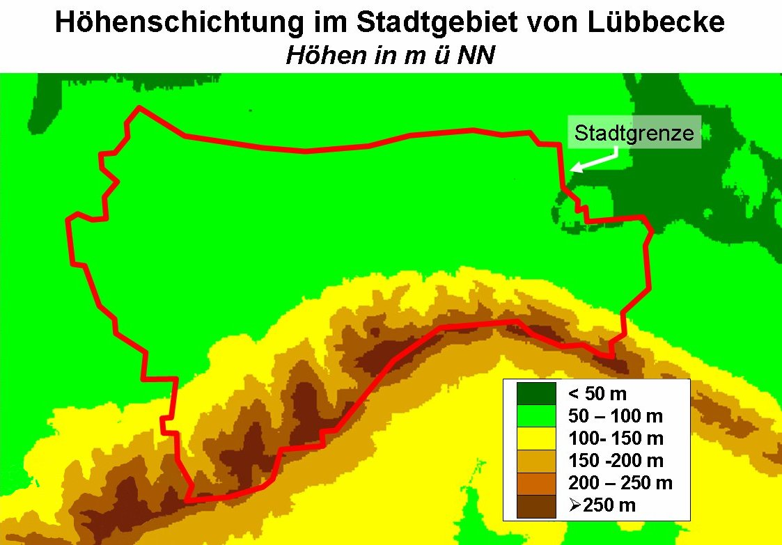 Das Bild wurde von mir, Falk Oberdorf, Osterstraße 6, 32312 Lübbecke erstellt. - 2006 Die gerbliche und/ oder private Nutzung des Bildes ist gestattet.